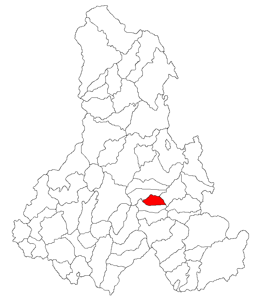 Categorie:Hărţi ale judeţului Harghita Contents 1 Licensing 2 Sursă 3 Licensing 4 Original upload log Licensing Sursă ro::Imagine:Harta_jud_Harghita.png